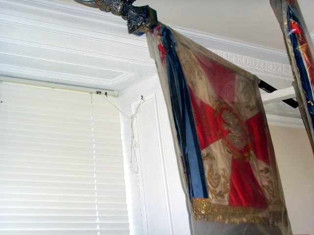 Eksponaty Instytutu im. Sikorskiego w Londynie. Sztandar 12 pułku ułanów